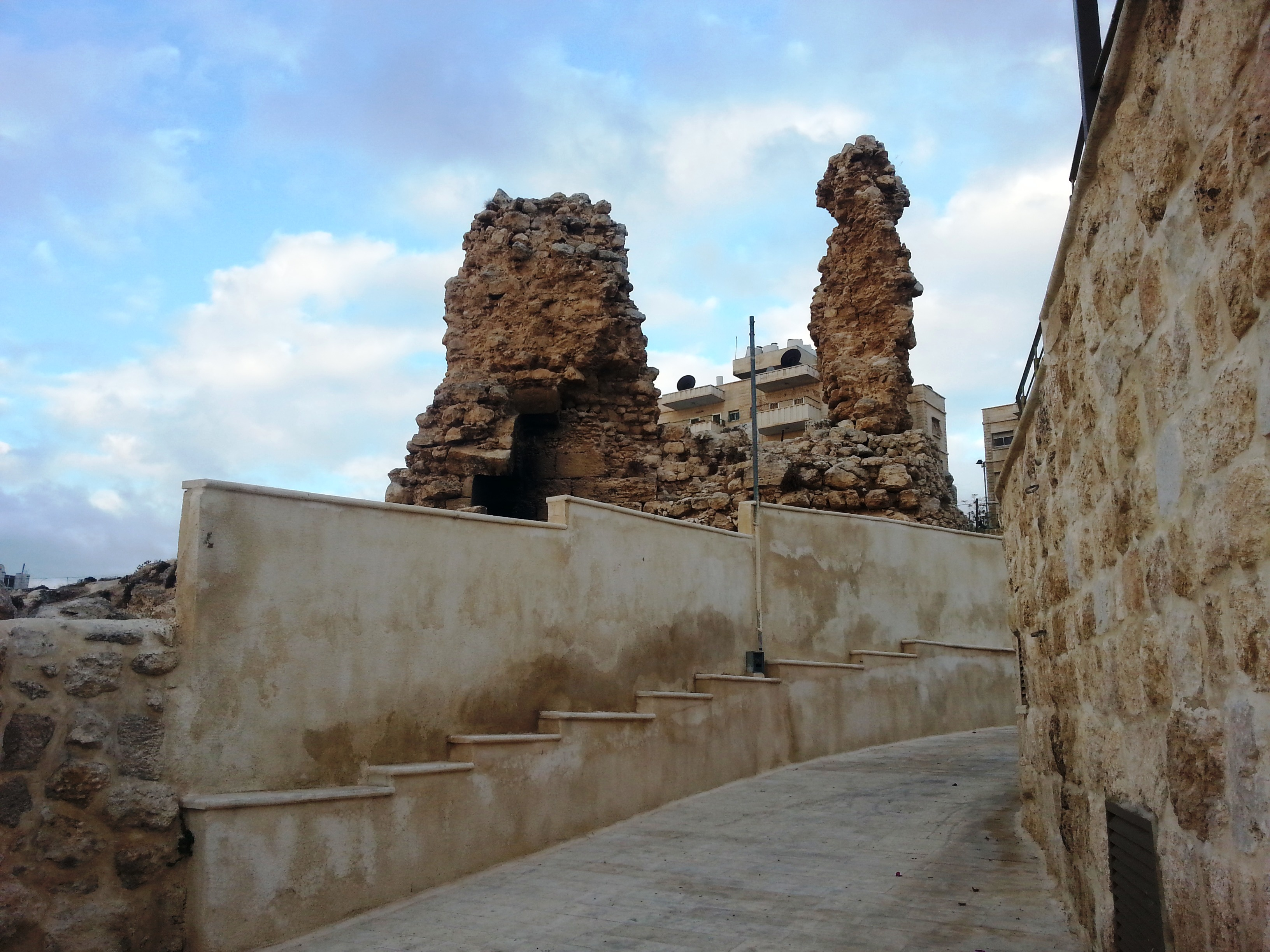 القناطر في بلدة العيزرية بالقدس تصوير نهيل أبو غيث